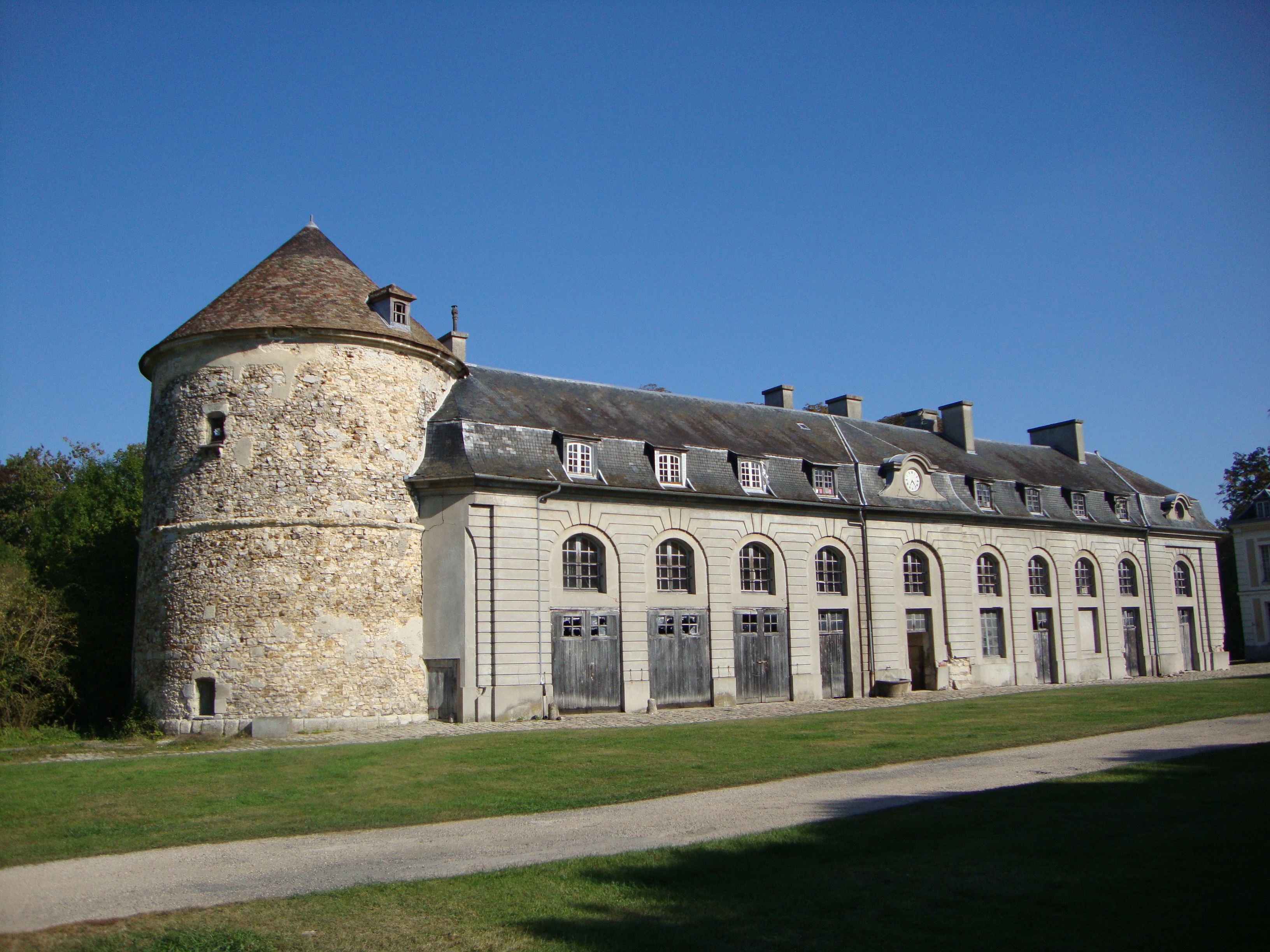 L86 - Pigeonnier et dépendances dans le parc du château de Brou-sur-Chantereine .